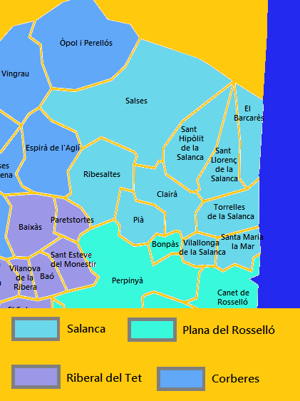 Mapa de la Salanca elaborat a partir d'un mapa de lliure distribució